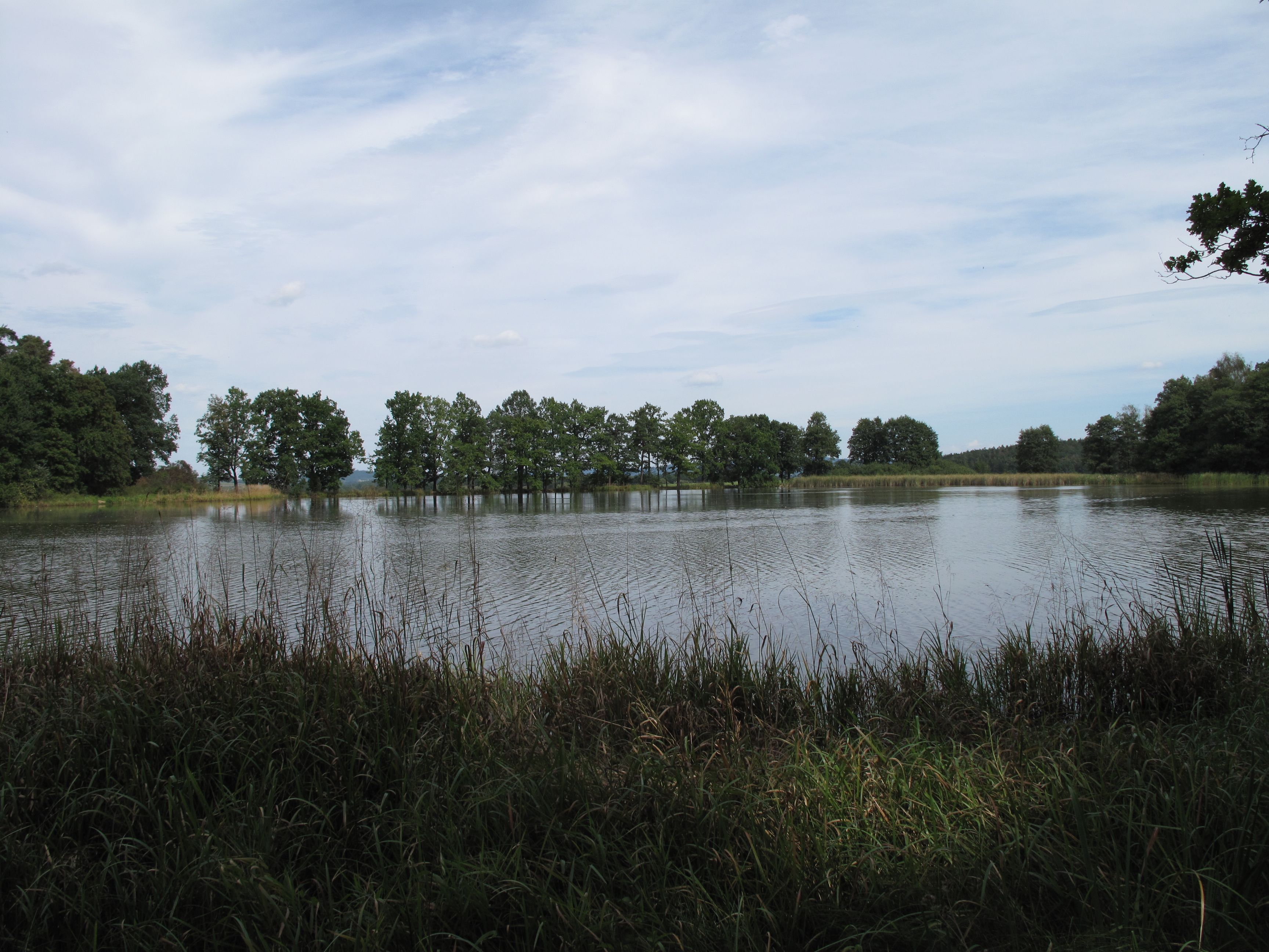 Kobylí Drač. Okres Písek, Česká republika.